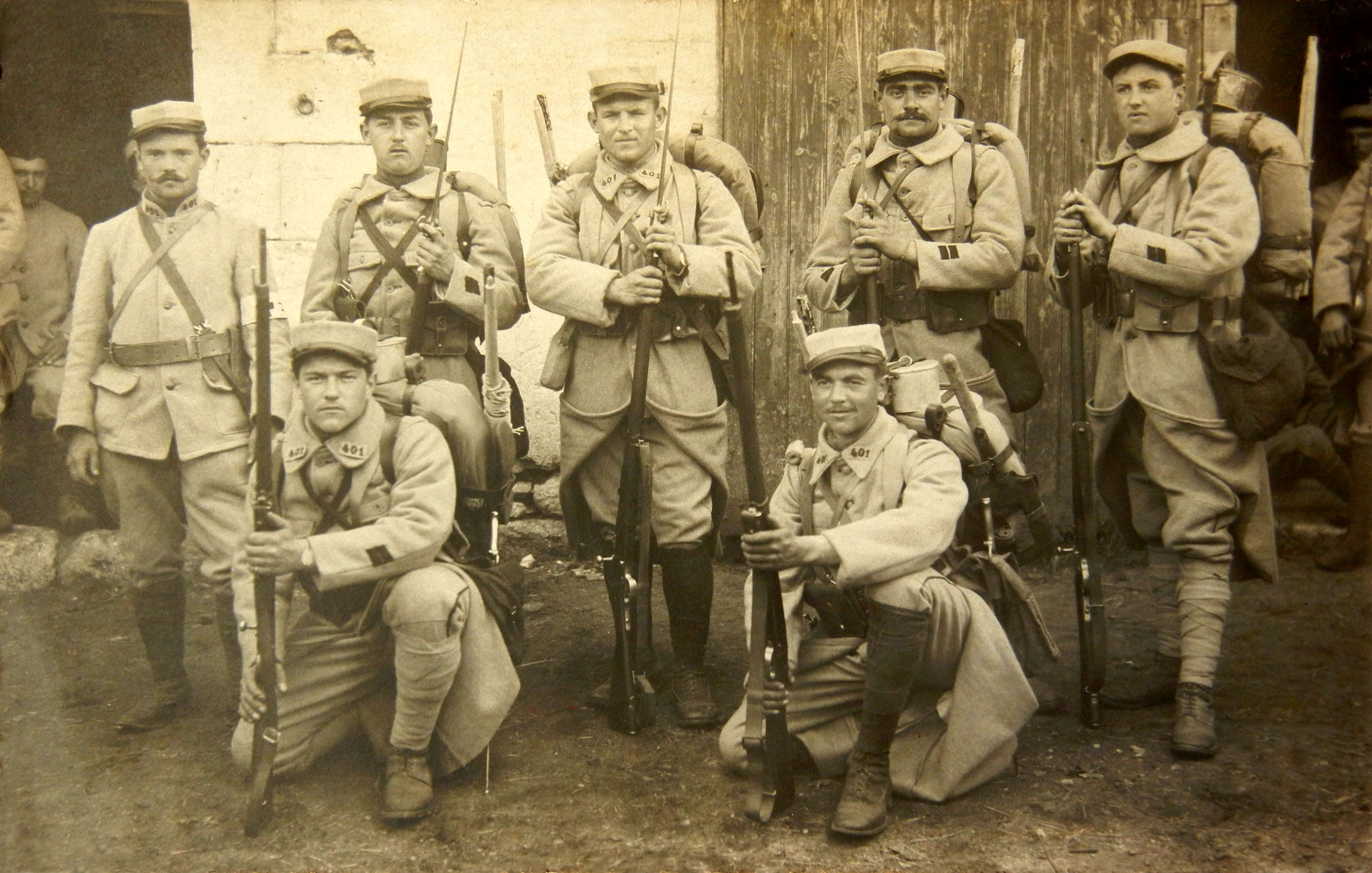 Soldats du 401e Régiment d'Infanterie lors de la 1ère guerre mondiale